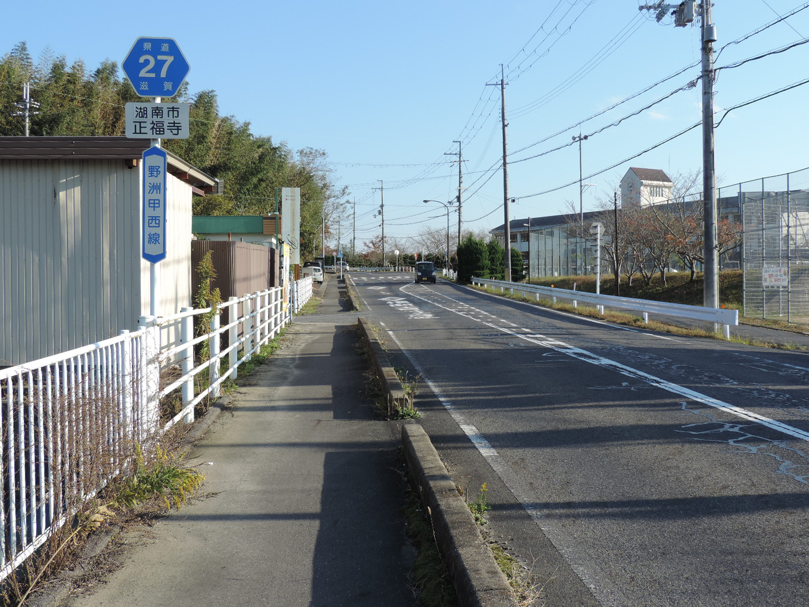 滋賀県道27号野洲甲西線。湖南市正福寺にて。2017年撮影